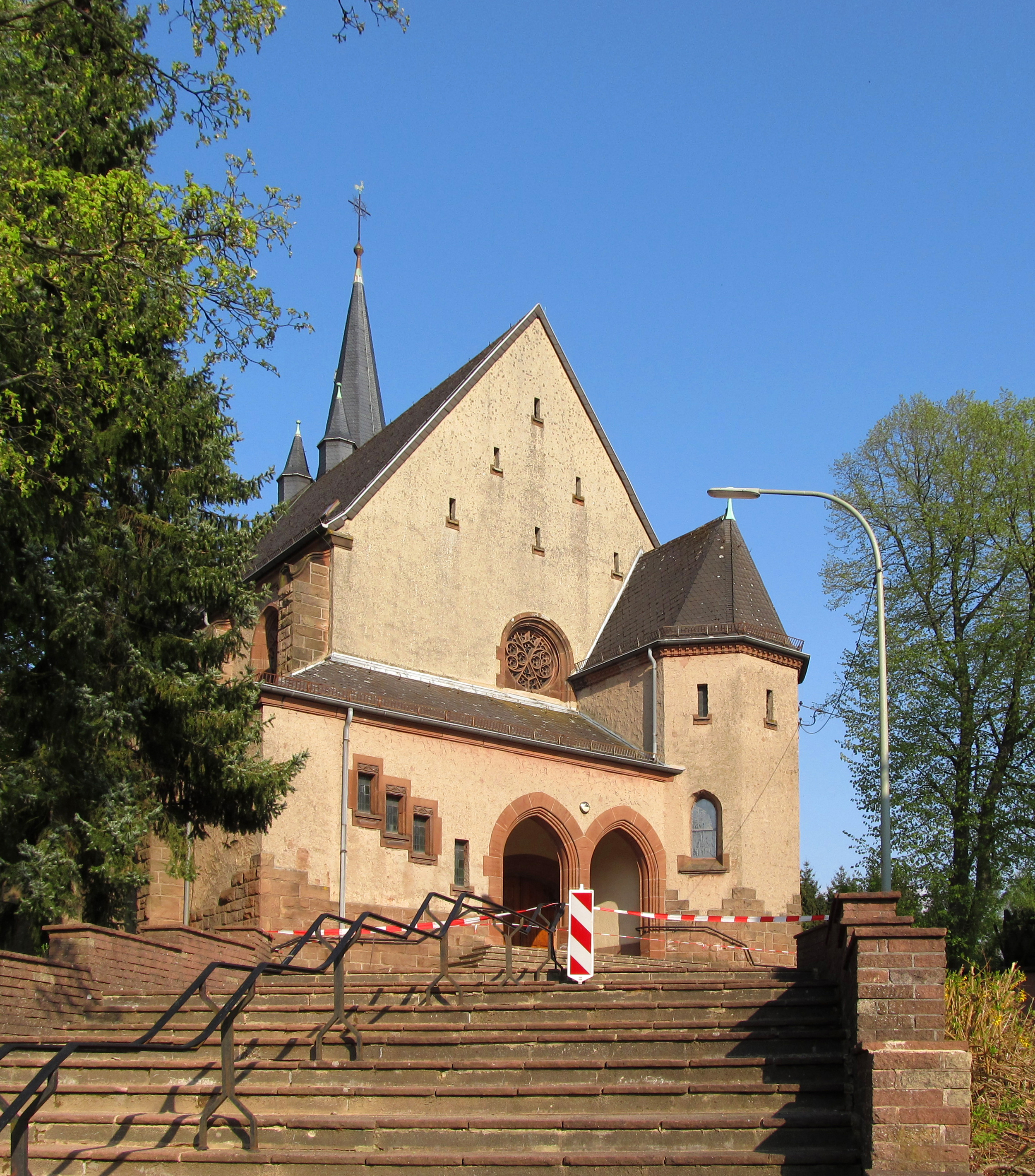 Die katholische Pfarrkirche St. Barbara in Stennweiler, einem Ortsteil der Gemeinde Schiffweiler, Landkreis Neunkirchen, Saarland